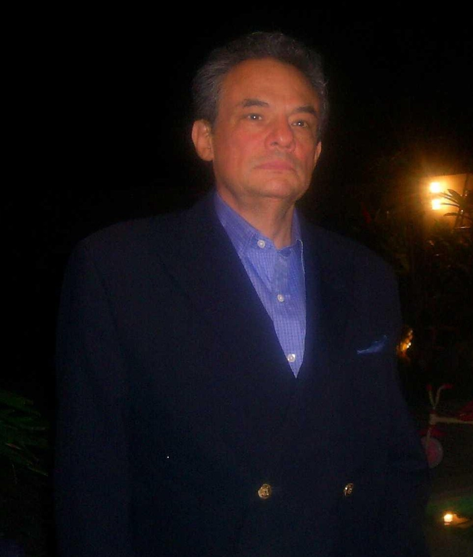 Jose Jose